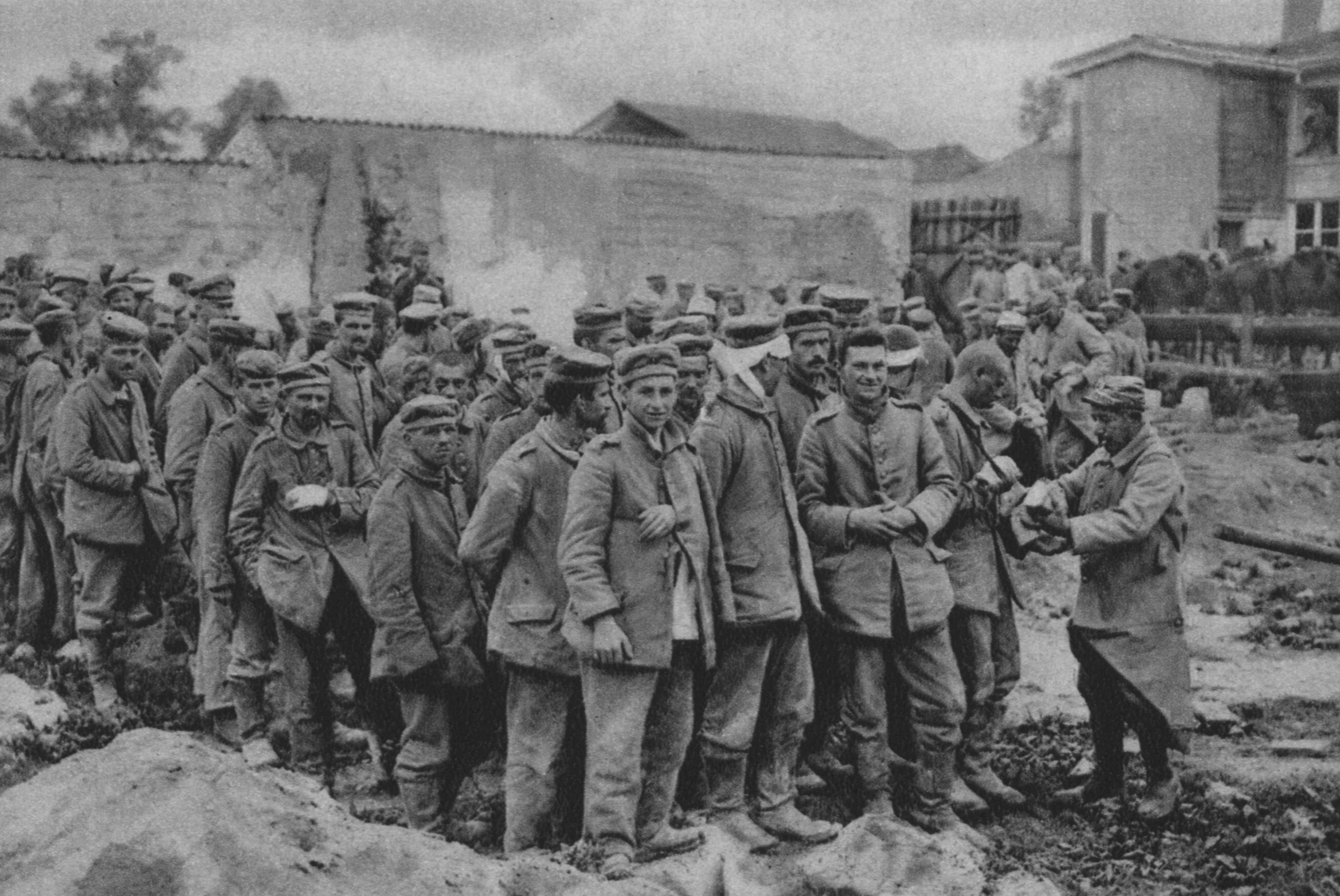 Verteilung von Brot an deutsche Gefangene in St. Etienne au Temple. (26. September 1915). Die Verluste an Gefangenen, Verwundeten und toten in der Herbstschlacht in der Champagne beliefen sich nach vorsichtigen Berechnungen bei den französischen truppen auf 130 000 Mann, bei den Engländern auf 60 000 Mann, wogegen die der deutschen noch nicht 1/5 dieser Zahl ausmachen.